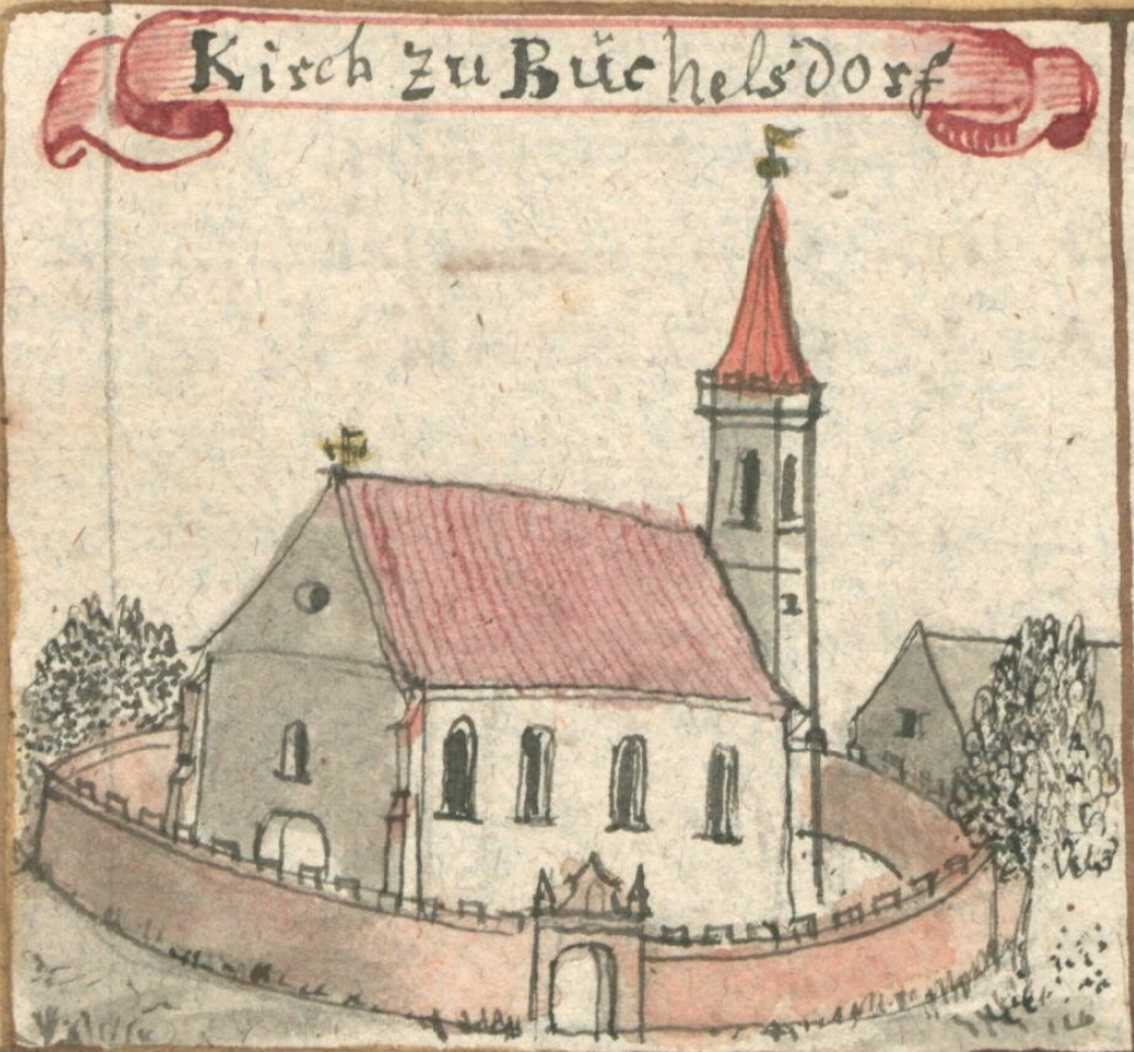 Kirch zu Buchelsdorf